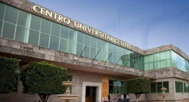 Plantel Olimpica, Ingenierías